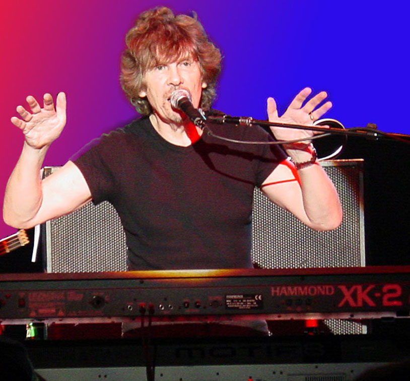 Rod Argent